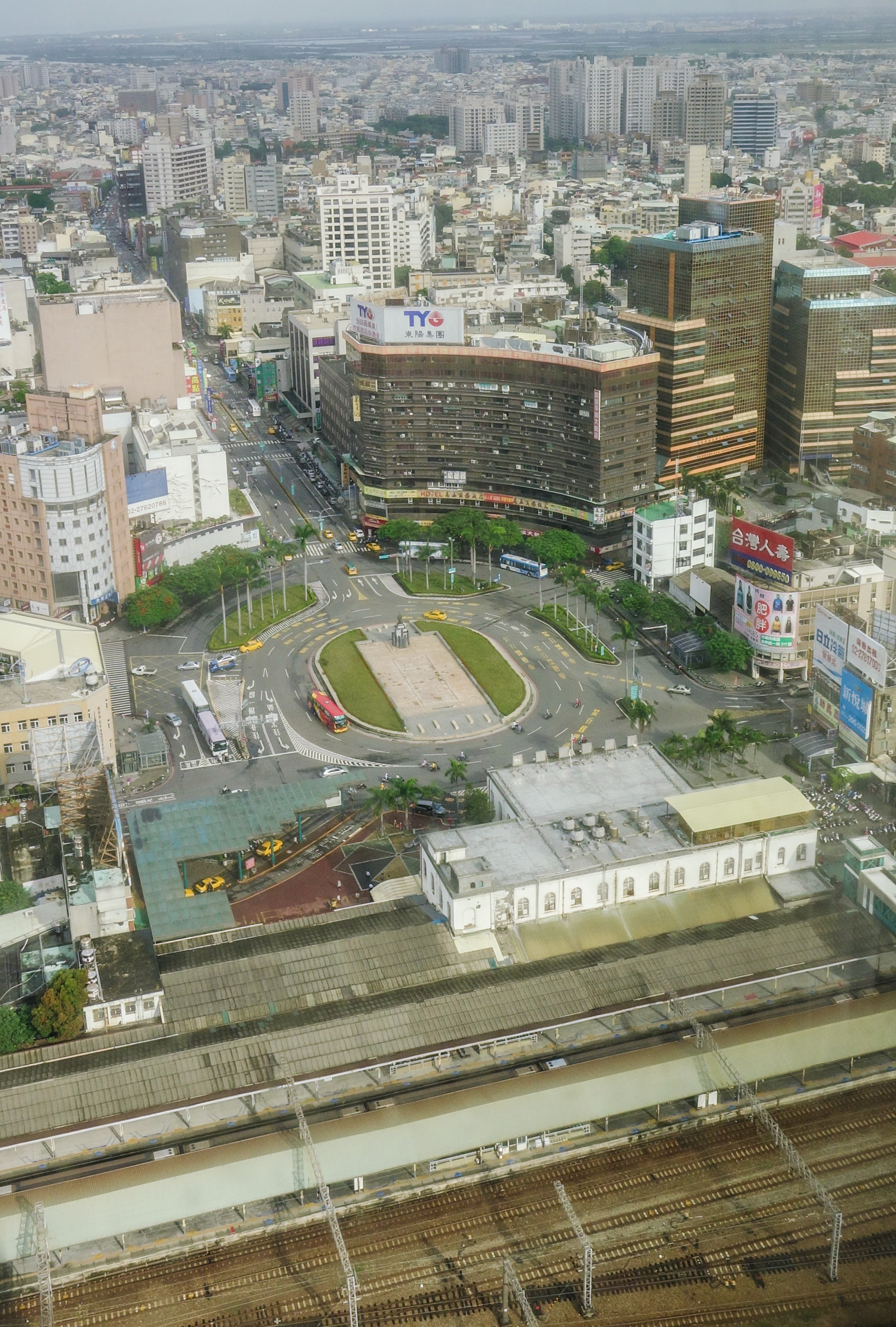 台南駅 駅前ロータリー